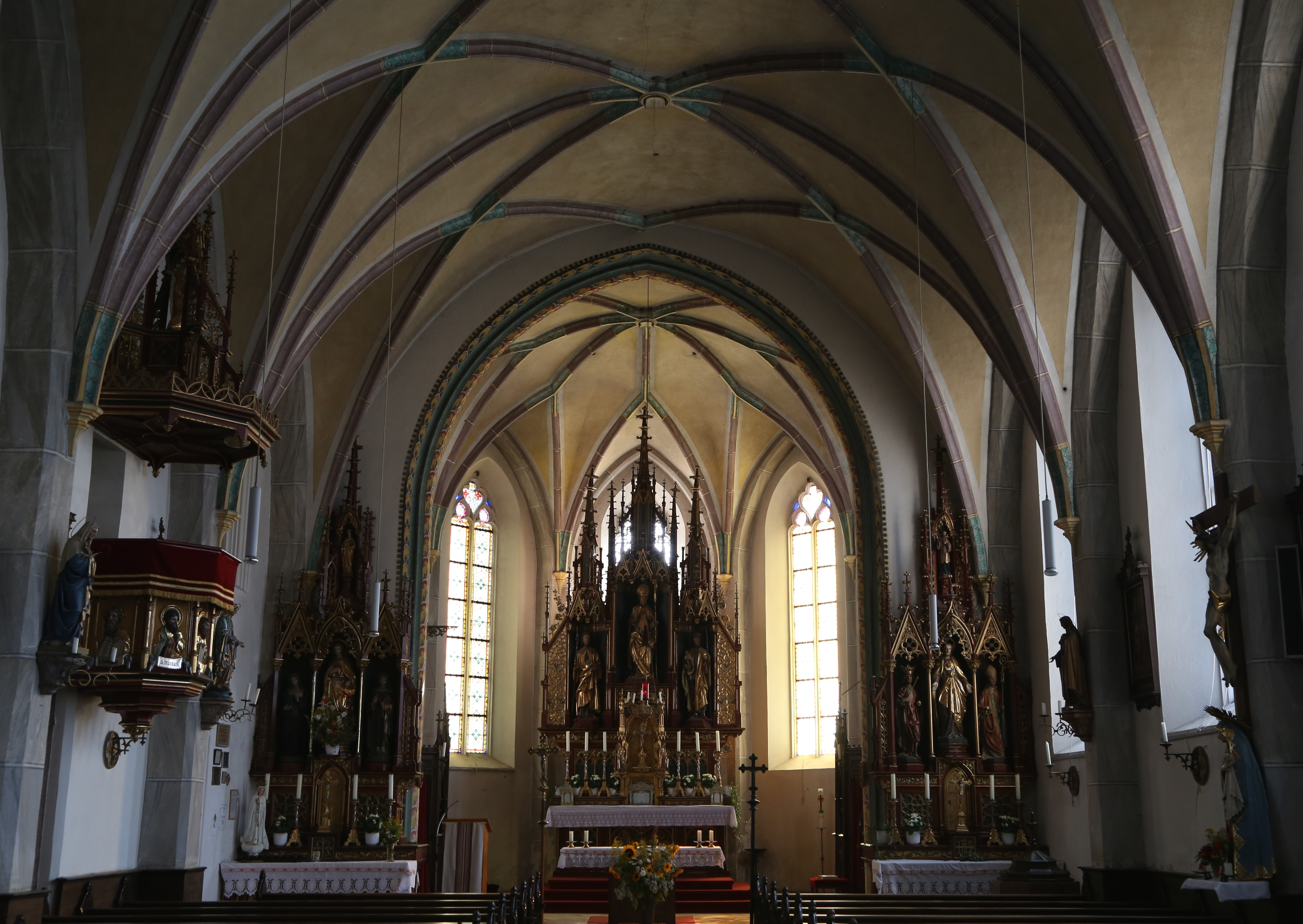 Haunpoldstraße 27, Kirchdorf a. Haunpold; Katholische Pfarrkirche St. Vigilius, Saalbau mit oktogonalem Westturm mit spitzhelm, spätgotische Anlage von Hans Holnstainer, teilweise barockisiert und regotisiert, 1470, 1697, 1875, 1927; mit Ausstattung